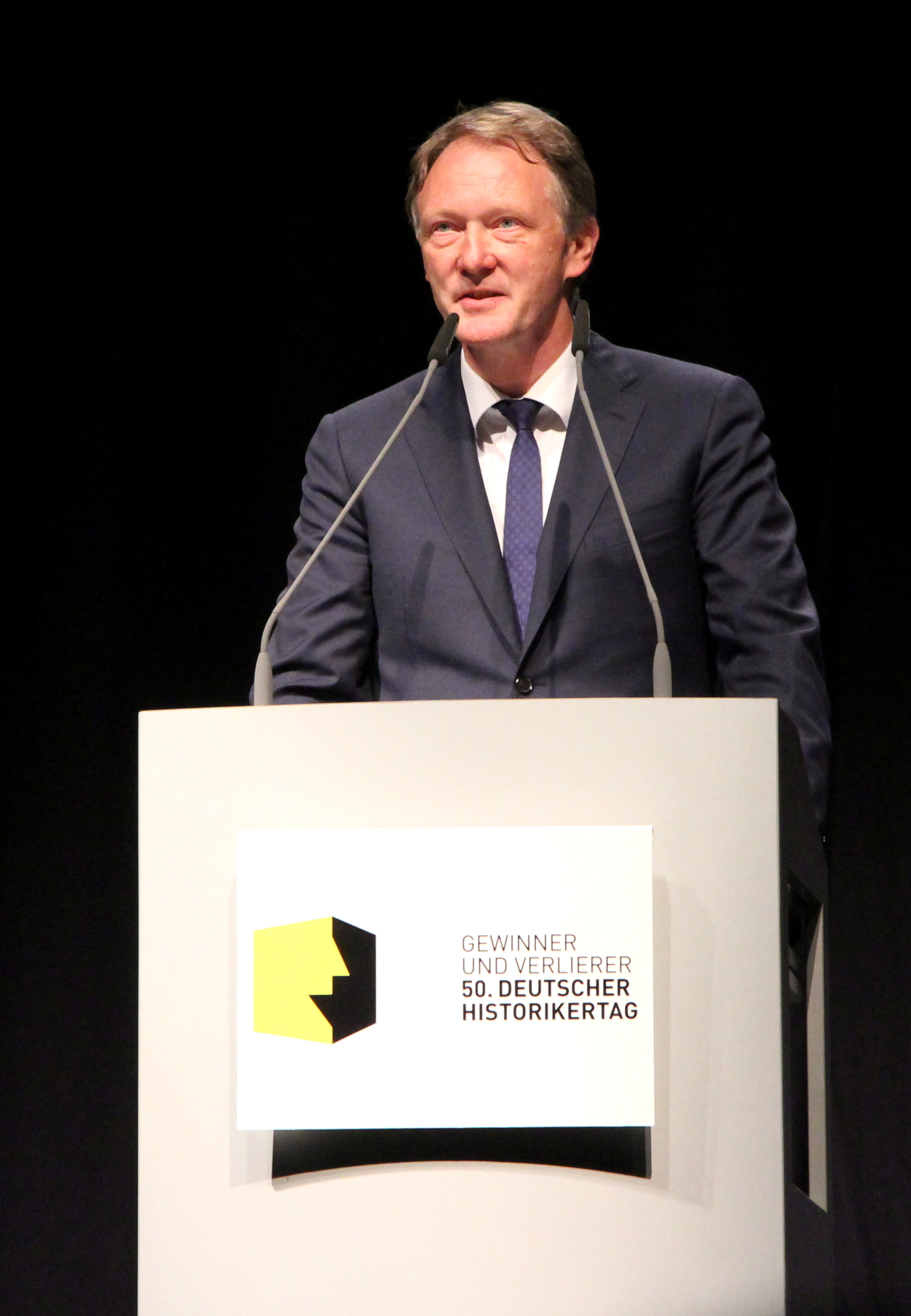 Historikertag 2014 in Göttingen.